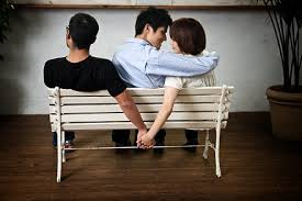 Fotografia donde se ve a dos parejas y como se une el tercero